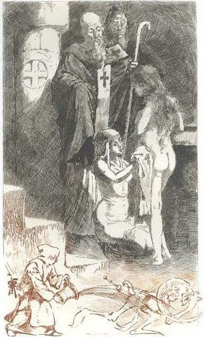 Dessins de Martin van Maële. Illustration du Thais d'Anatole France. 1901.